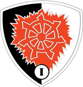 Gambar ini adalah Lambang Koops AU I